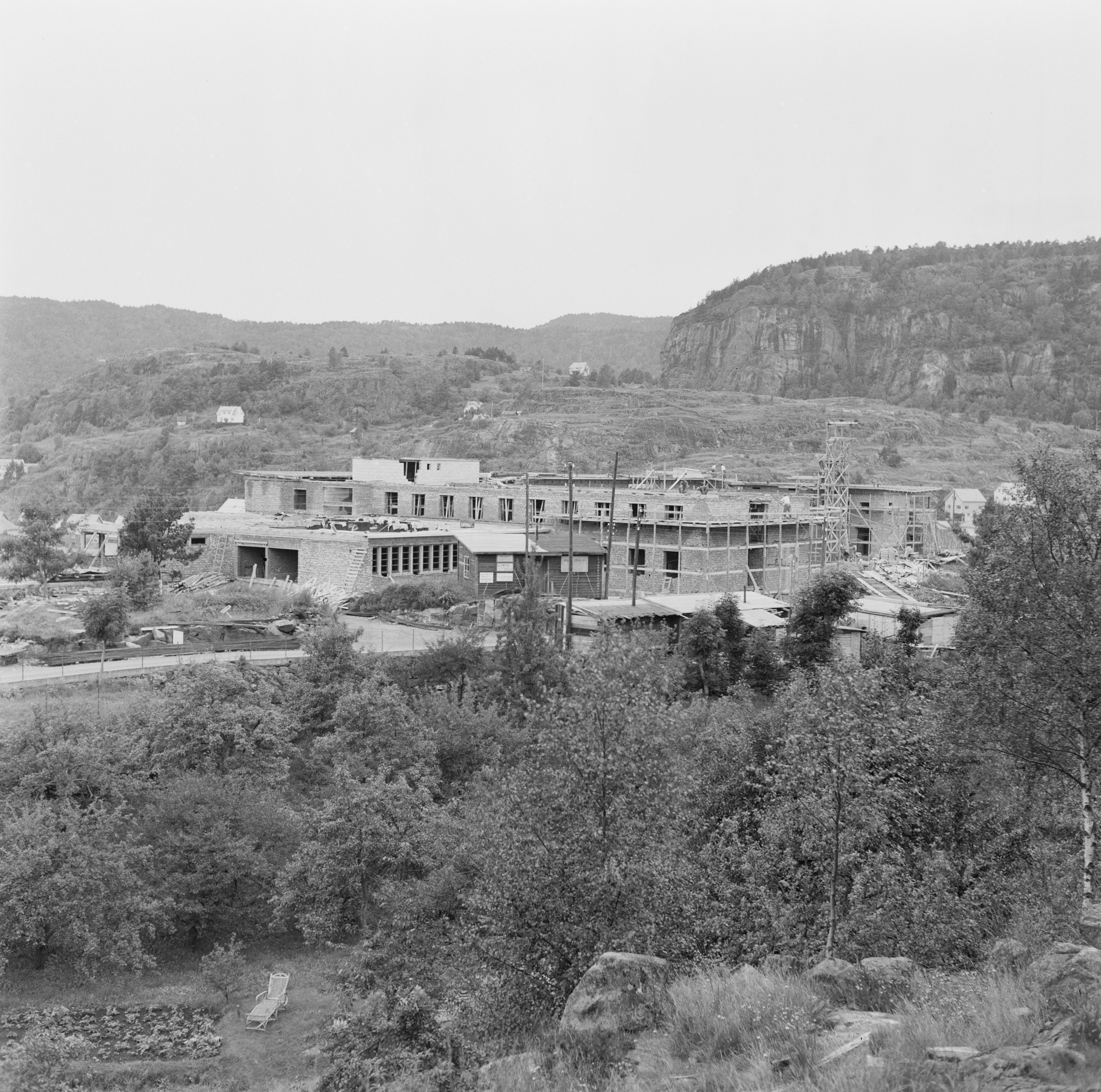 Bildet er hentet fra Arkivverket. Flekkefjord, nytt sykehus, havna Arkivinstitusjon : Riksarkivet Arkivnavn : Billedbladet NÅ Sted : Norge, Vest-Agder, Flekkefjord, Flekkefjord Emneord: Sykehus, Landskap Avbildet